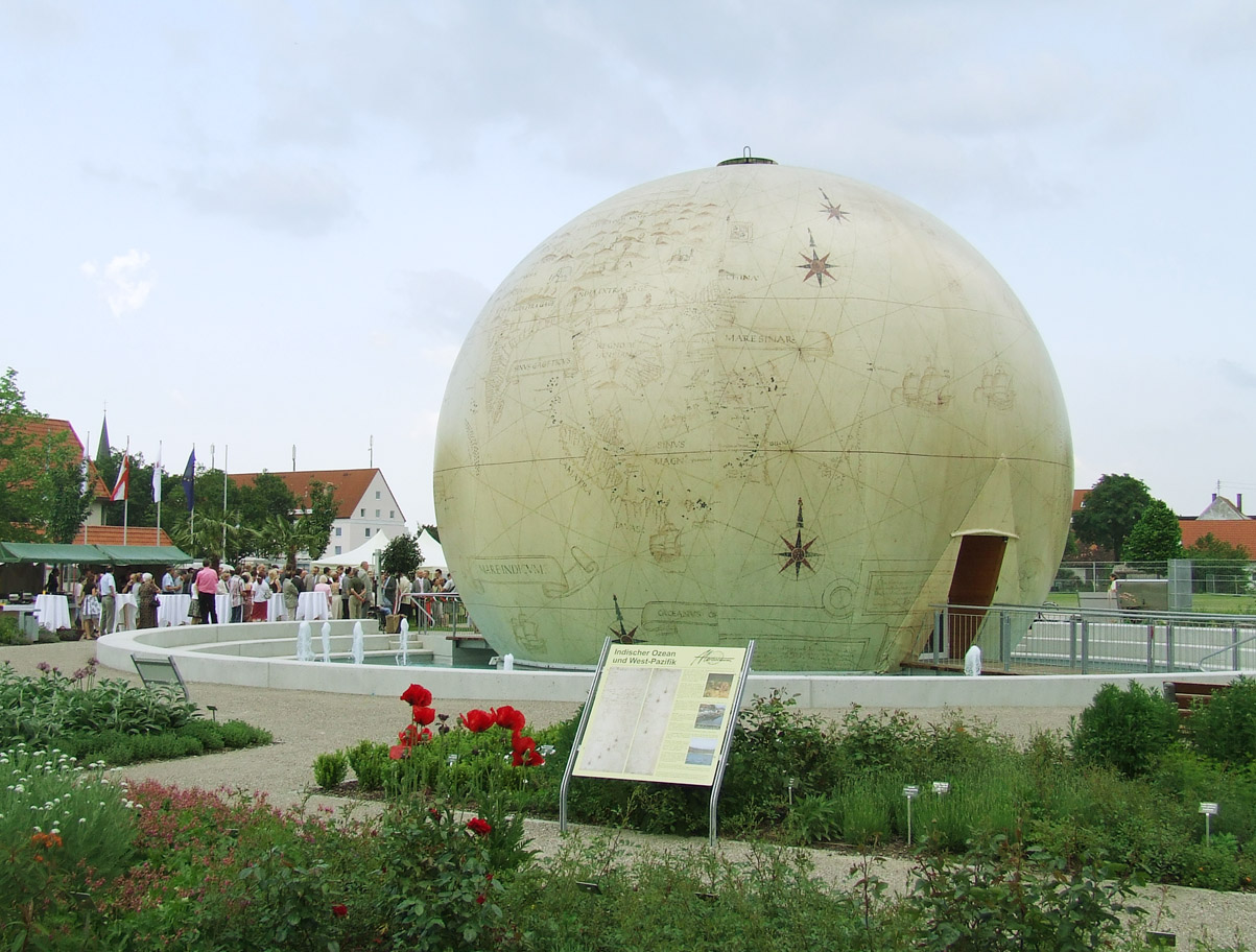 Das Mercateum in Königsbrunn, Deutschland.